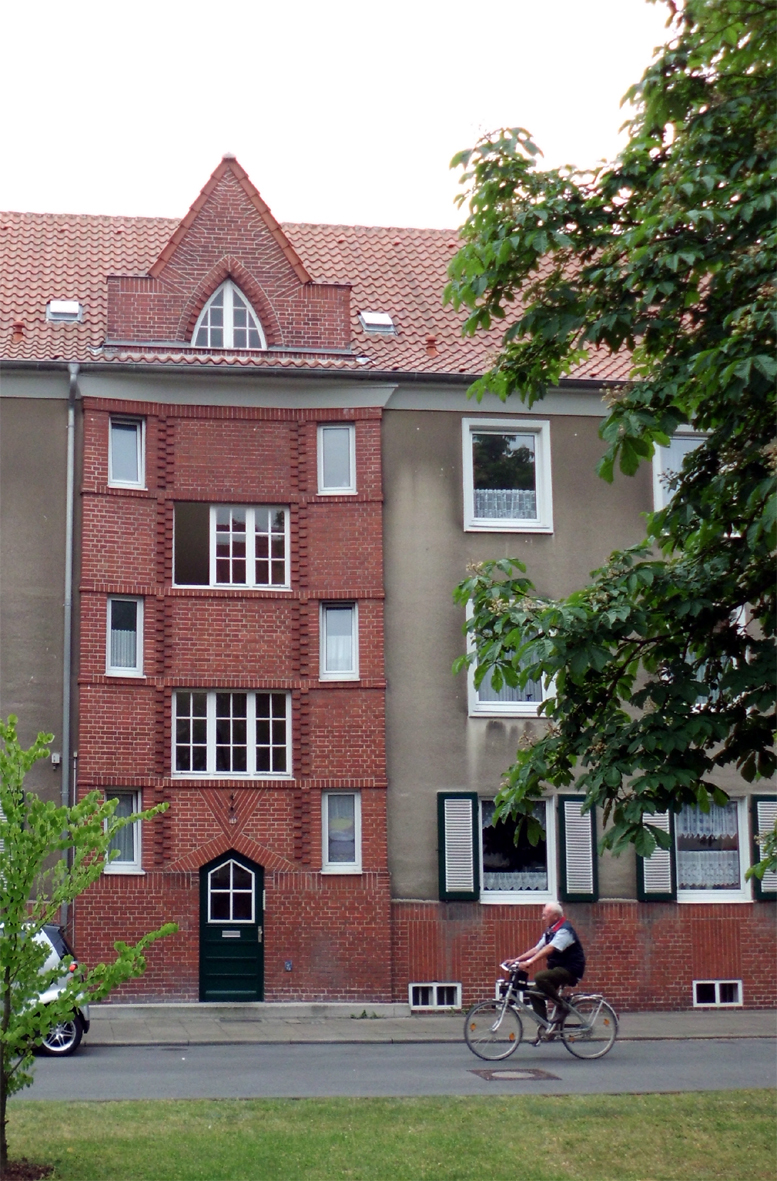 Bielefeld, Denkmalnummer 454, Teilbaugebiet der Freien Scholle von 1925/26 am Heeper Fichten